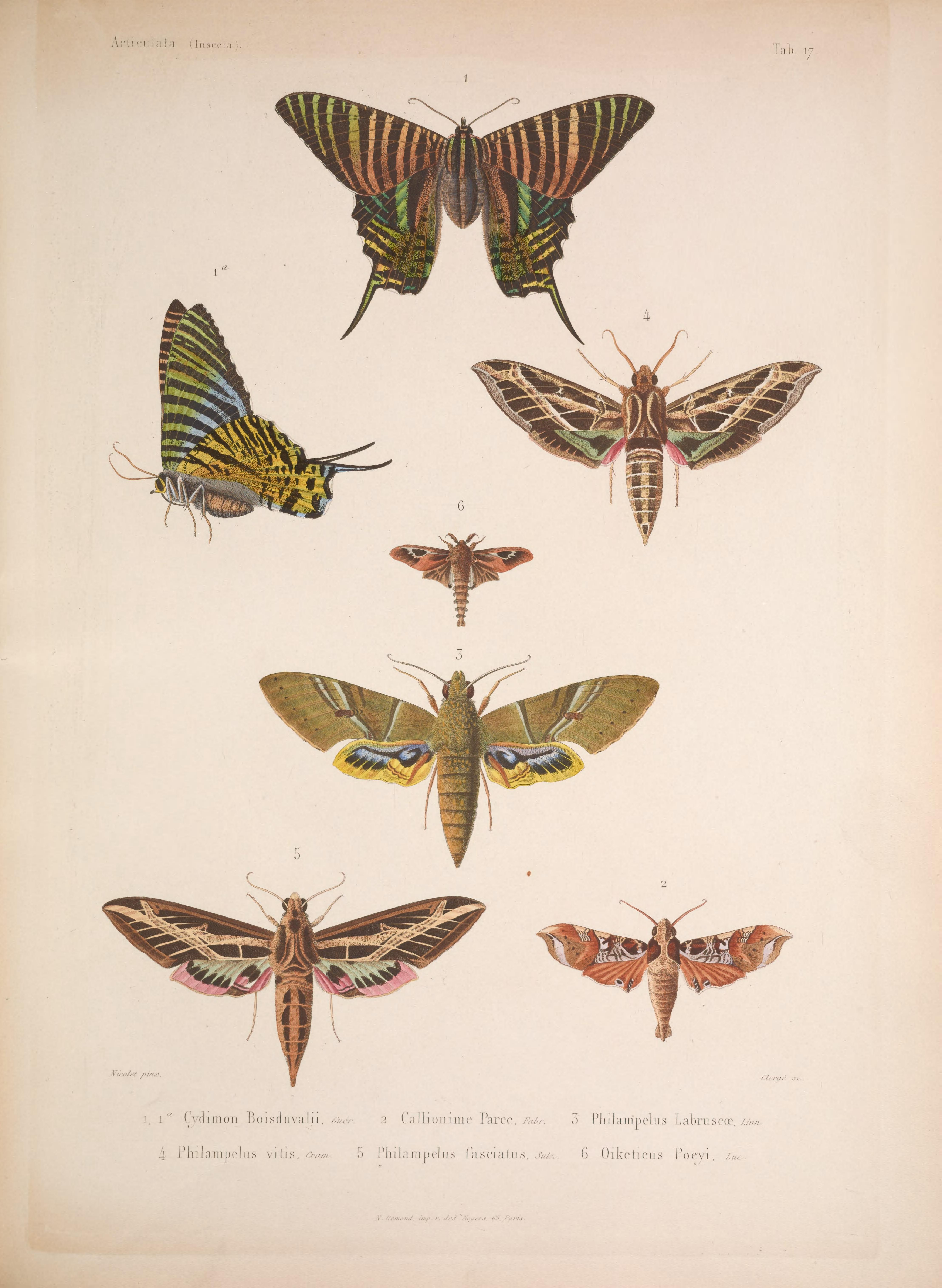 Histoire physique, politique et naturelle de l'ile de Cuba Fig.Name on PlateAccepted name (May 2016)1Cydimon boisduvaliiUrania boisduvalii2Callionime parceCallionima parce3Philampelus labruscaeEumorpha labruscae4Philampelus vitisEumorpha vitis5Philampelus fasciatusEumorpha fasciatus6Oiketicus poeyiOiketicus kirbyi